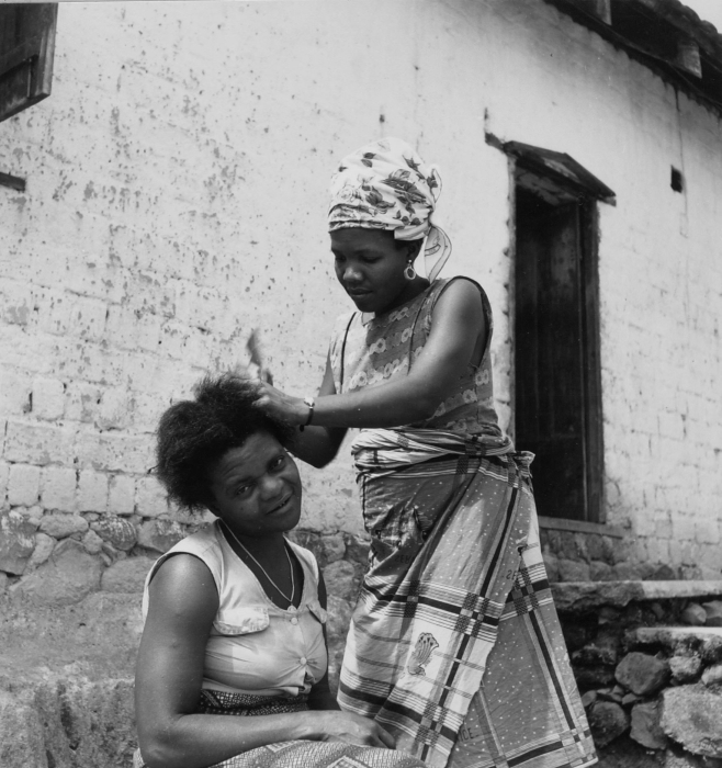 Bafut is een dorp in het noorden van Kameroen en bestond rond 1960 uit zo'n 26 wijken met rond de 20.000 inwoners. De lokale bestuurder, de Fon van Bafut, heeft tevens zeggenschap over nog zes aangrenzende dorpen waarmee zijn totale gebied 340 vierkante kilometer omvat (Ritzenthaler 1962: 12). Het paleis van de Fon ligt nagenoeg in het centrum van het dorp en bestaat uit 44 gebouwen die door een muur omgeven zijn. De tiende Fon, Achirimbi II, wiens naam 'hij die eeuwig leeft' betekent, had in 1959 meer dan twintig vrouwen en zo'n 100 kinderen waarvan er nog zo'n vijftig binnen zijn kraal gehuisvest werden. De dame waarvan het haar gekapt wordt staat op een groepsfoto in Ritzenthaler met het bijschrift 'the Fon of Bafut with four of his wifes' (1962: 21), ook staat ze naast de Fon op een foto met Achirimbi in vol ornaat. Vermoedelijk is zij dan ook één van zijn twee senior vrouwen en is de andere dame een van de (negentien) junior vrouwen. Achirimbi II was ten tijde van deze opname ergens tussen de 75 en 70 jaar. Hij behoorde tot een van de machtigste lokale leiders van Kameroen en was Fon van 1932 tot en met 1968.